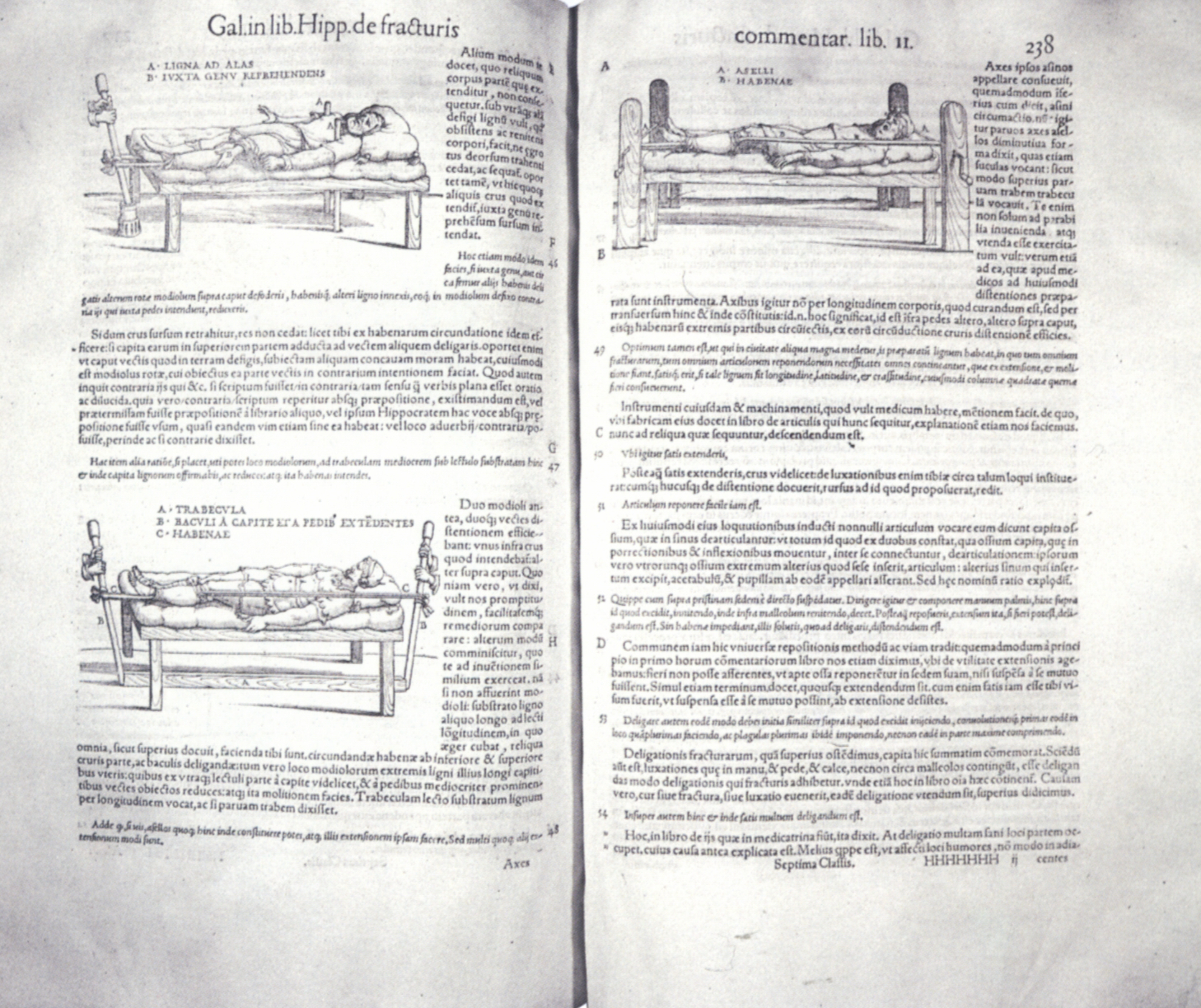 Galen: Opera, Iunta's Erben, Venedig 1550, Titelblatt (Prädikantenbibliothek Isny)